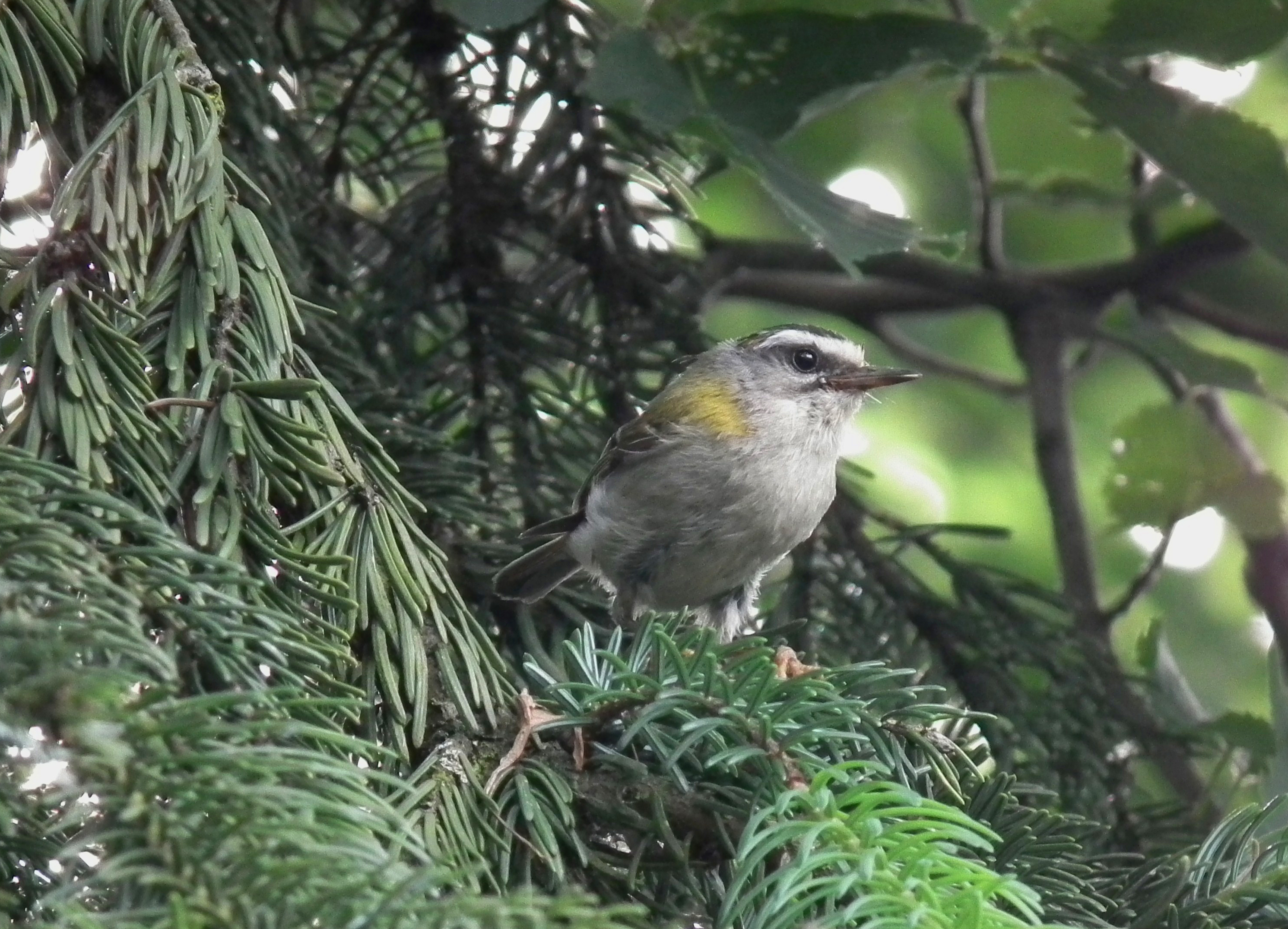 Sommergoldhänchen Regulus ignicapilla, fotografiert in Südhessen (Deutschland)